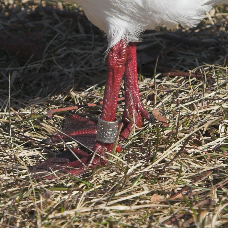 Kuva rengastetun lokin jaloista